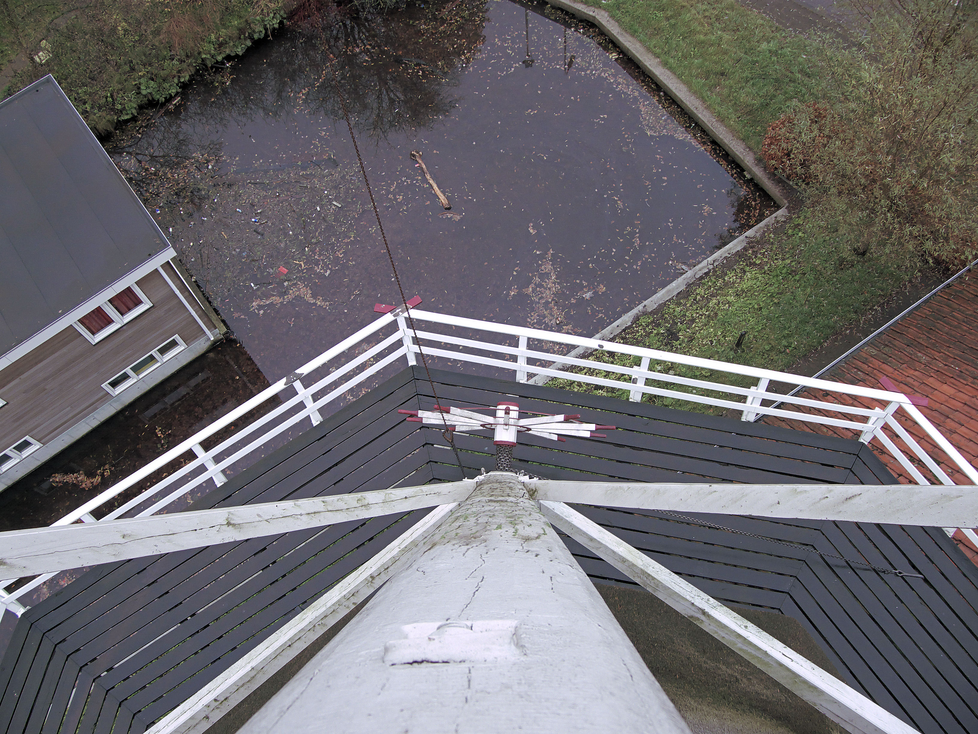 Molen De Passiebloem staart gezien vanuit het achterkeuvelens